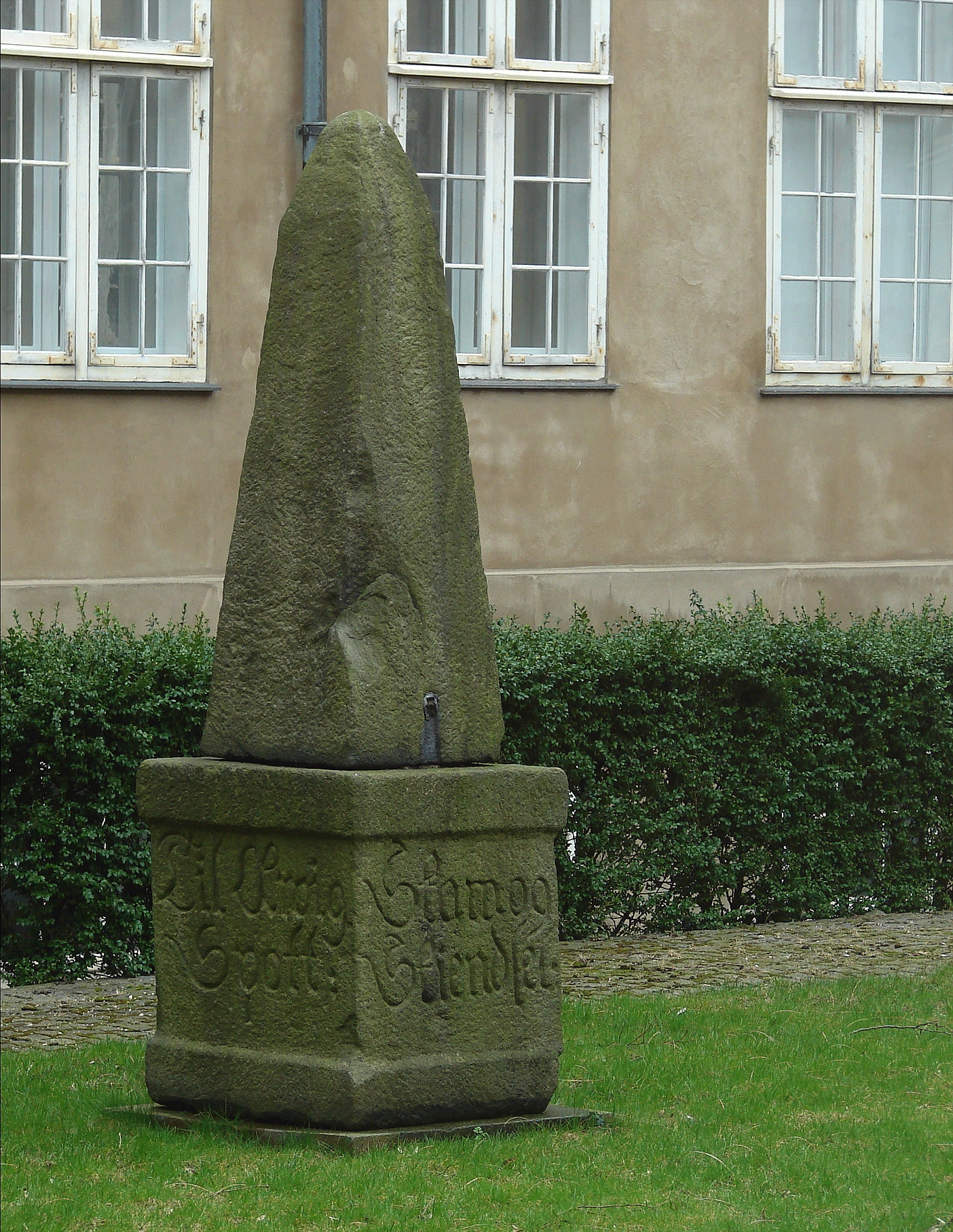 Skamstøtte over Corfitz Ulfeldt, tidligere på Ulfeldts Plads/Gråbrødretorv, nu på Nationalmuséet, København